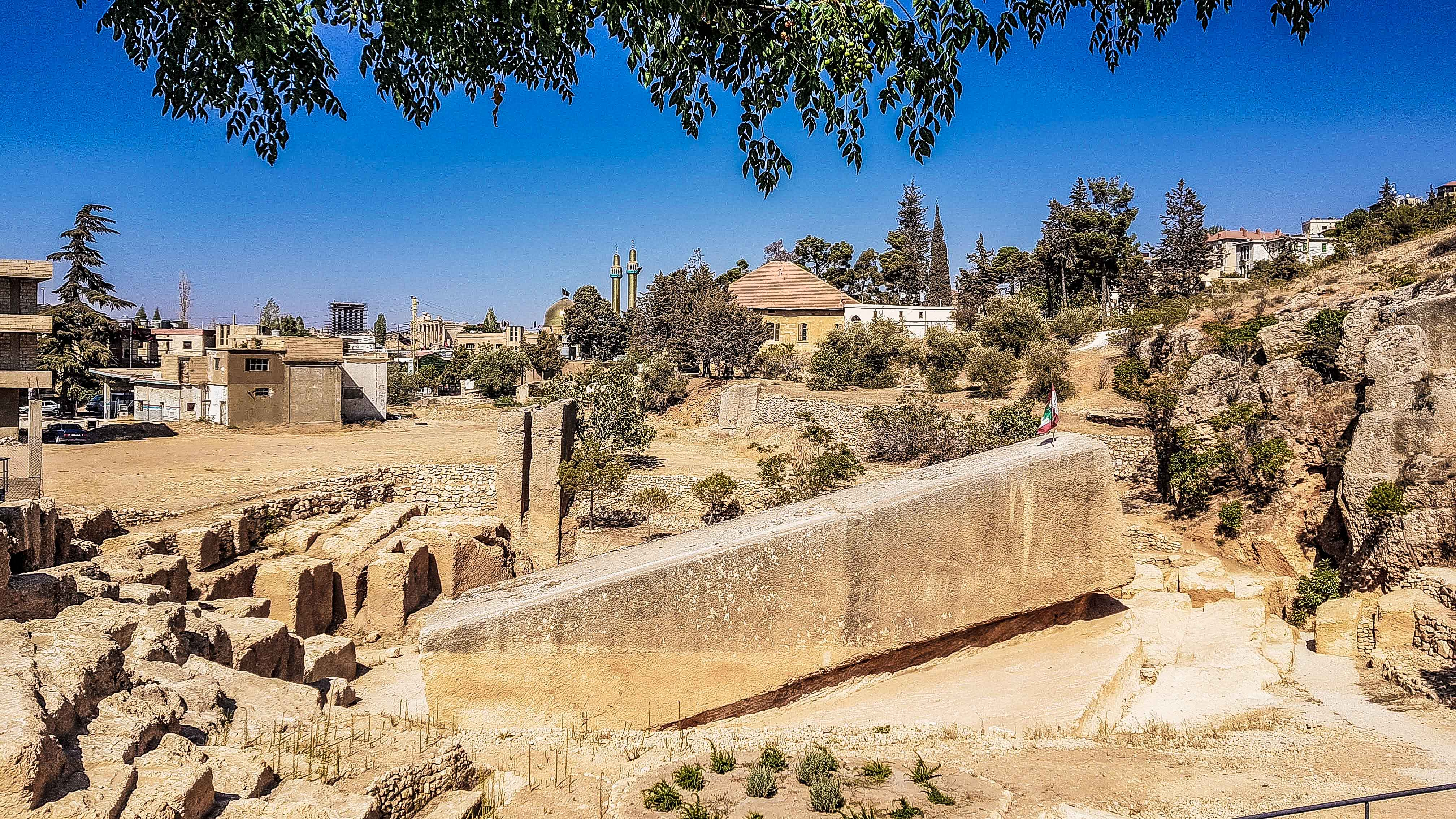 Zweitgrößter Monolith der Welt aufgenommen im September 2018